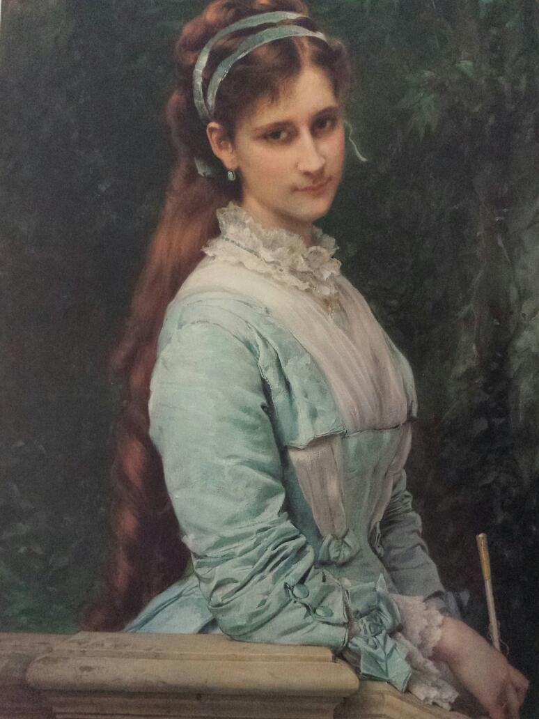 Depicted person: Medora Vallambrosa, Marquise de Mores – American wartime nurse